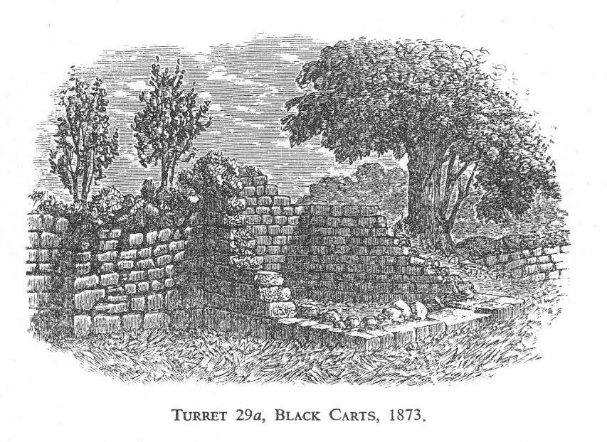 Hadrianswall: Zeichnung Wachturm 29a, Black Carts, Zustand um 1873.